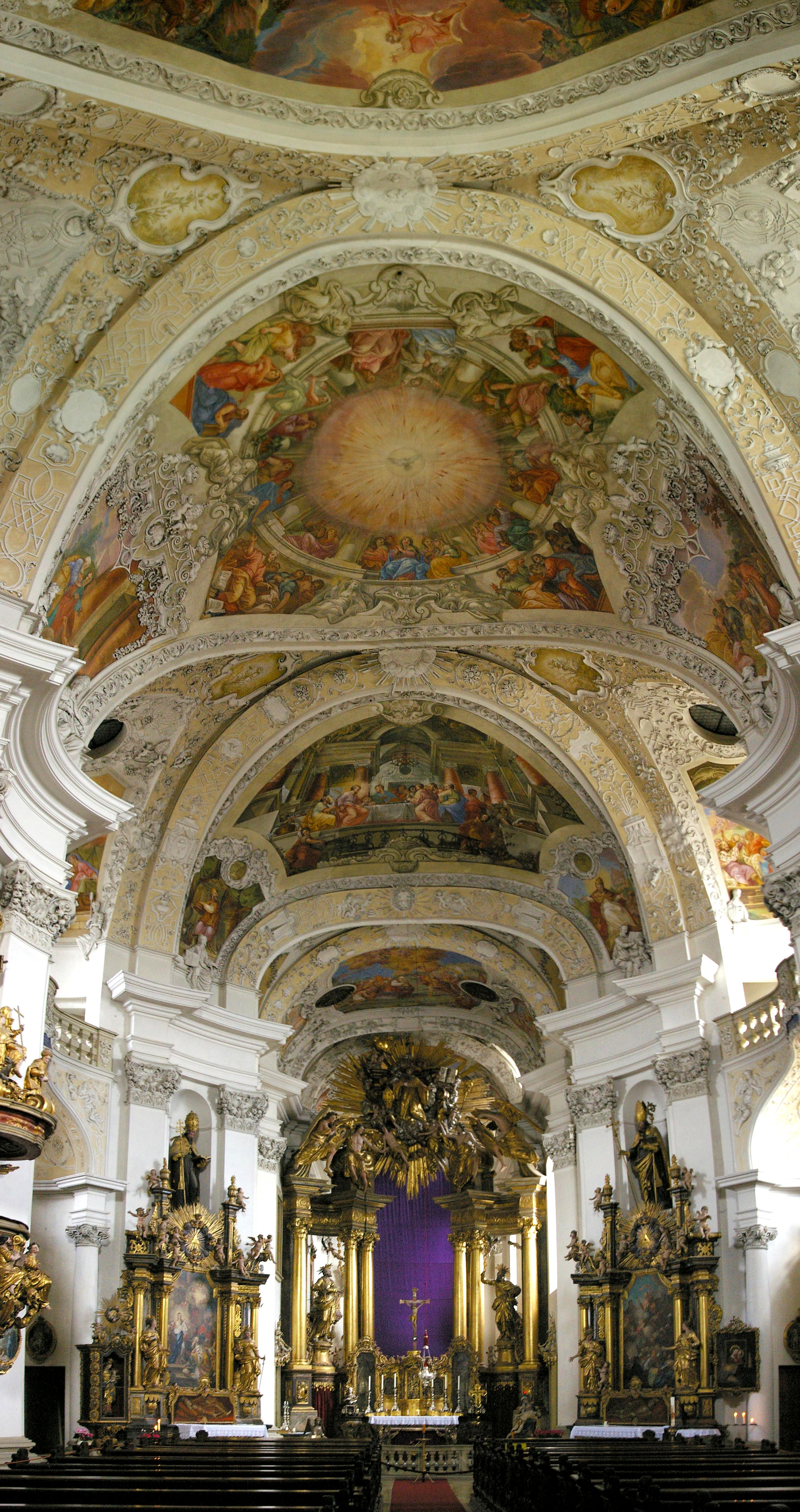 Kloster Banz - Panorama innen